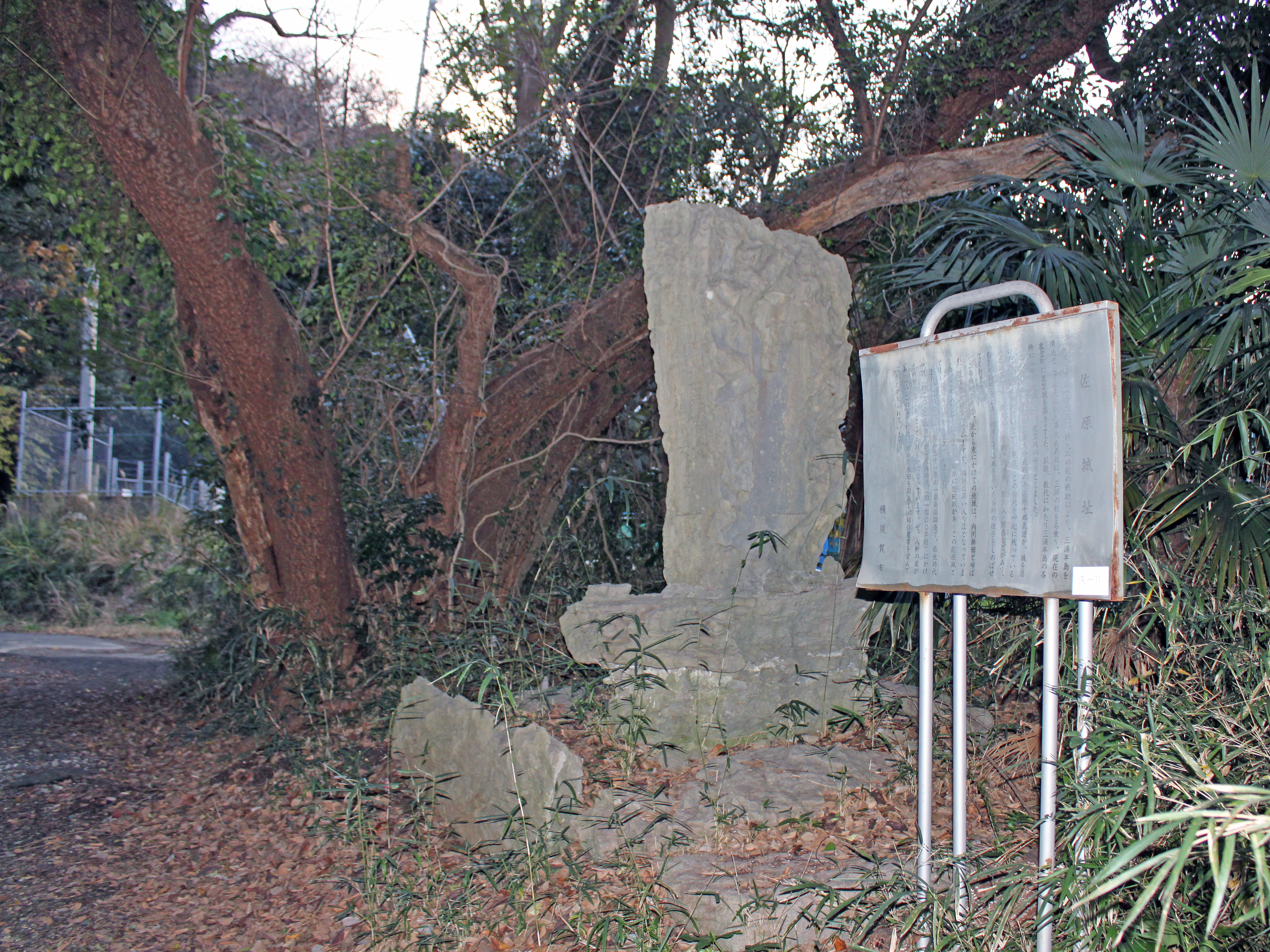 1893年（明治26年）建立の佐原城跡の碑